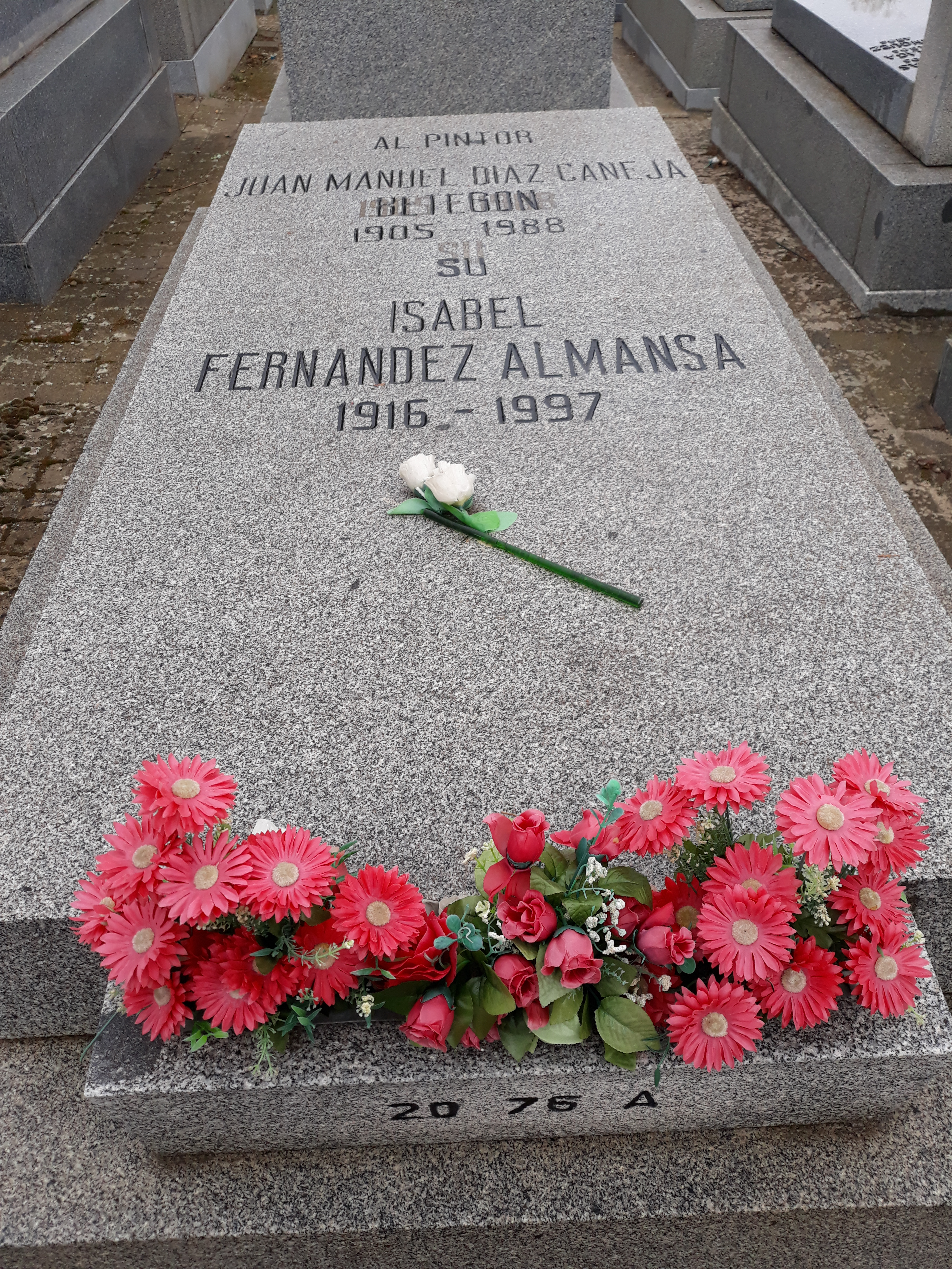 Das Grab des spanischen Malers Juan Manuel Diaz Caneja auf dem Cementerio civil de Madrid.